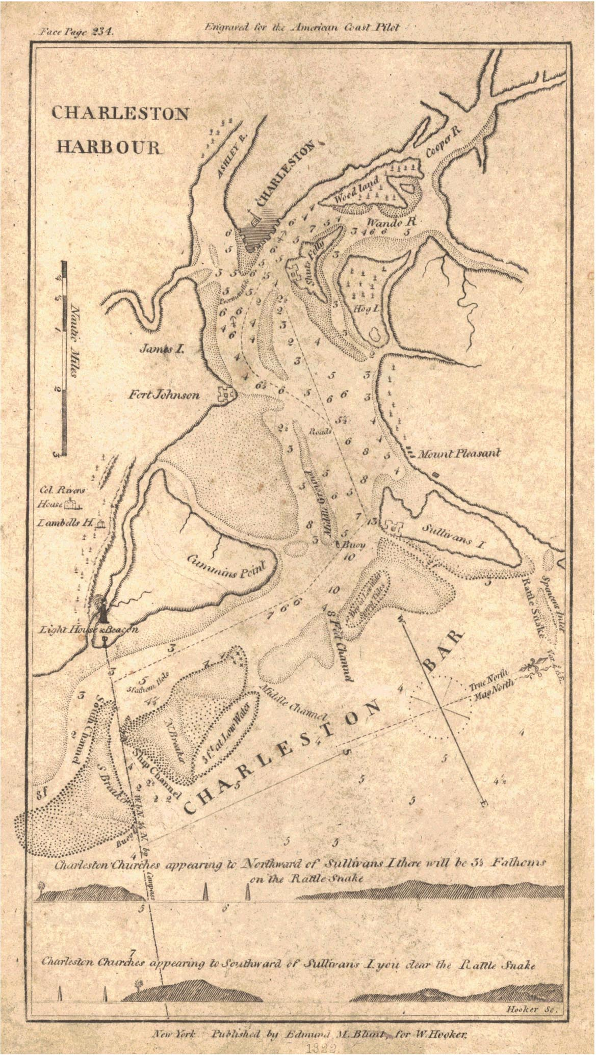 "Charleston Harbour"